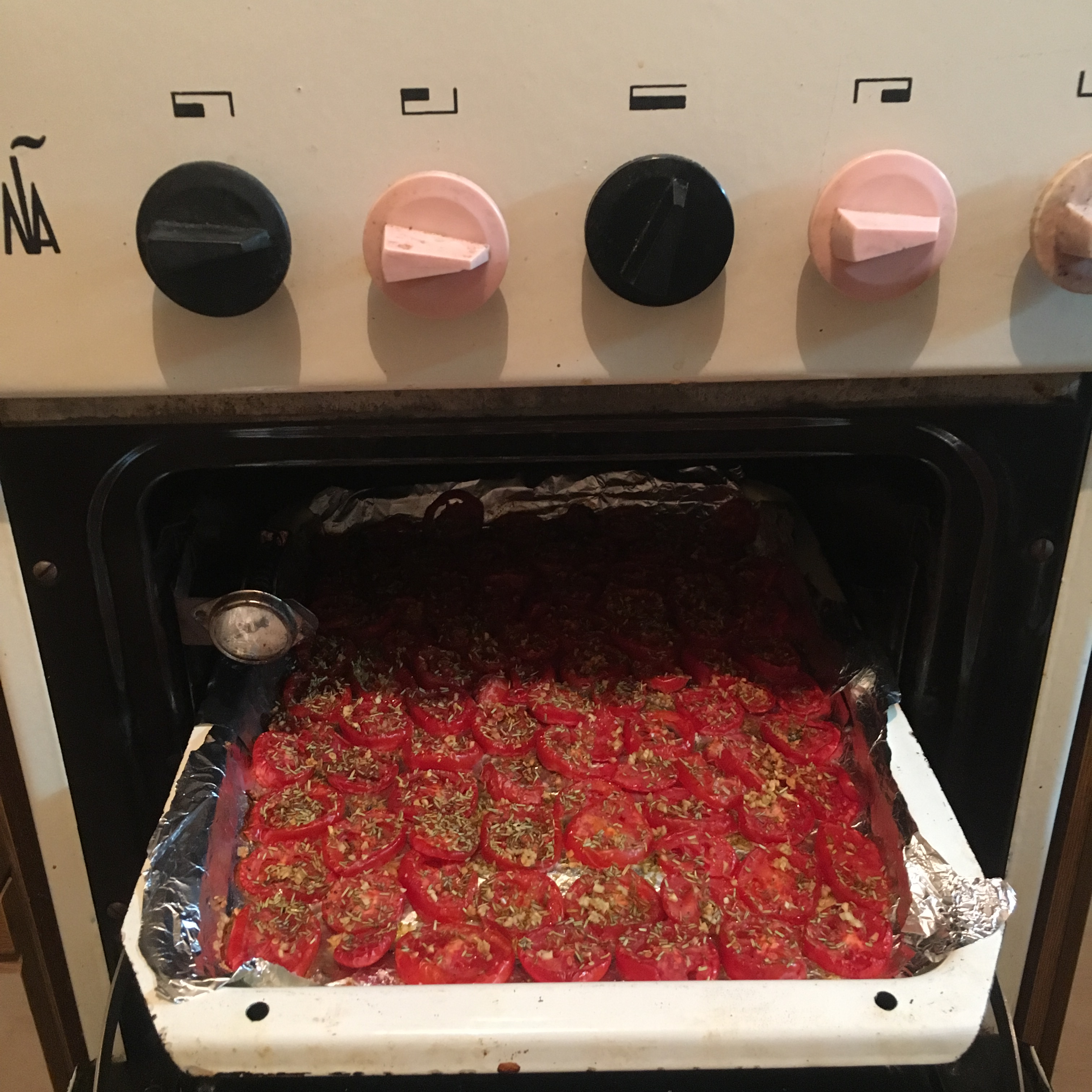 Вяленые томаты в духовке